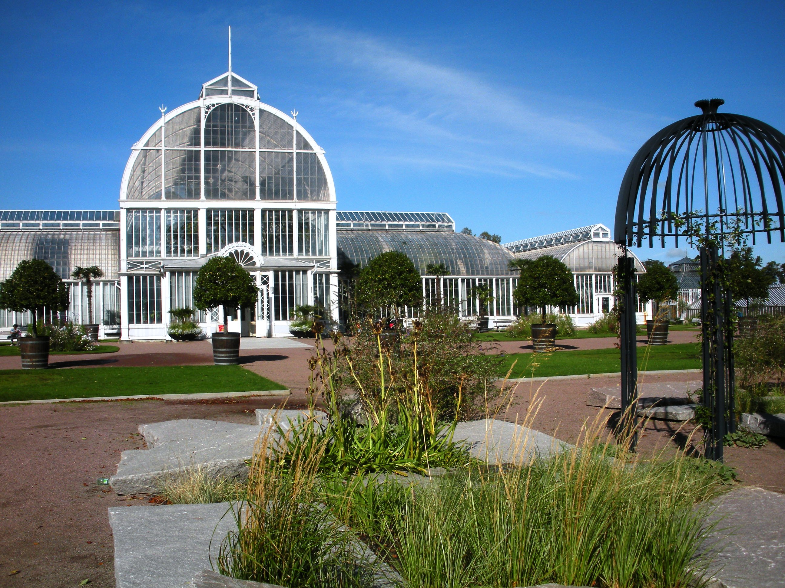 Palmhuset i Trädgårdsföreningen, Göteborg